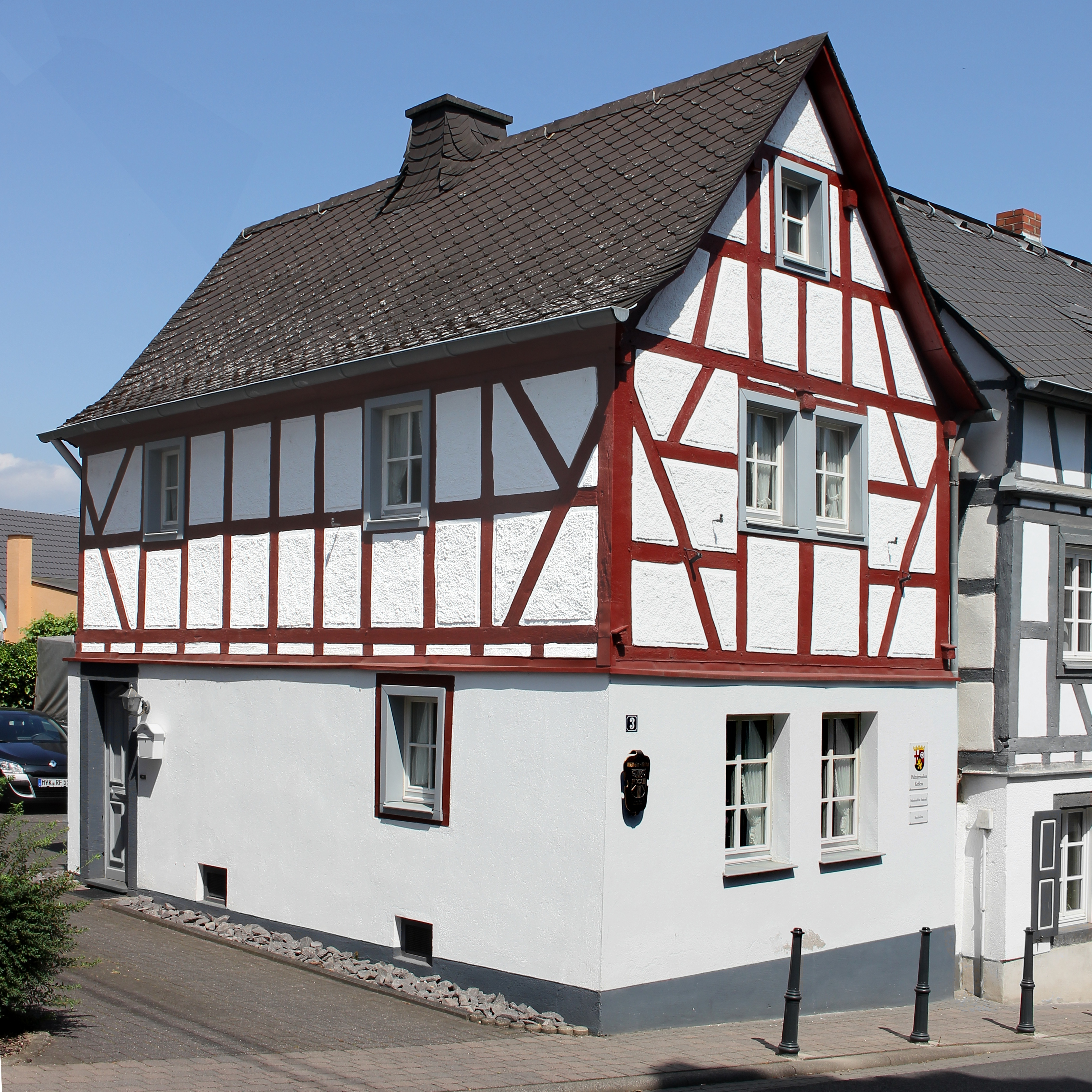 Fachwerkhaus Burgstraße 3 in Mülheim-Kärlich, 19. Jahrhundert